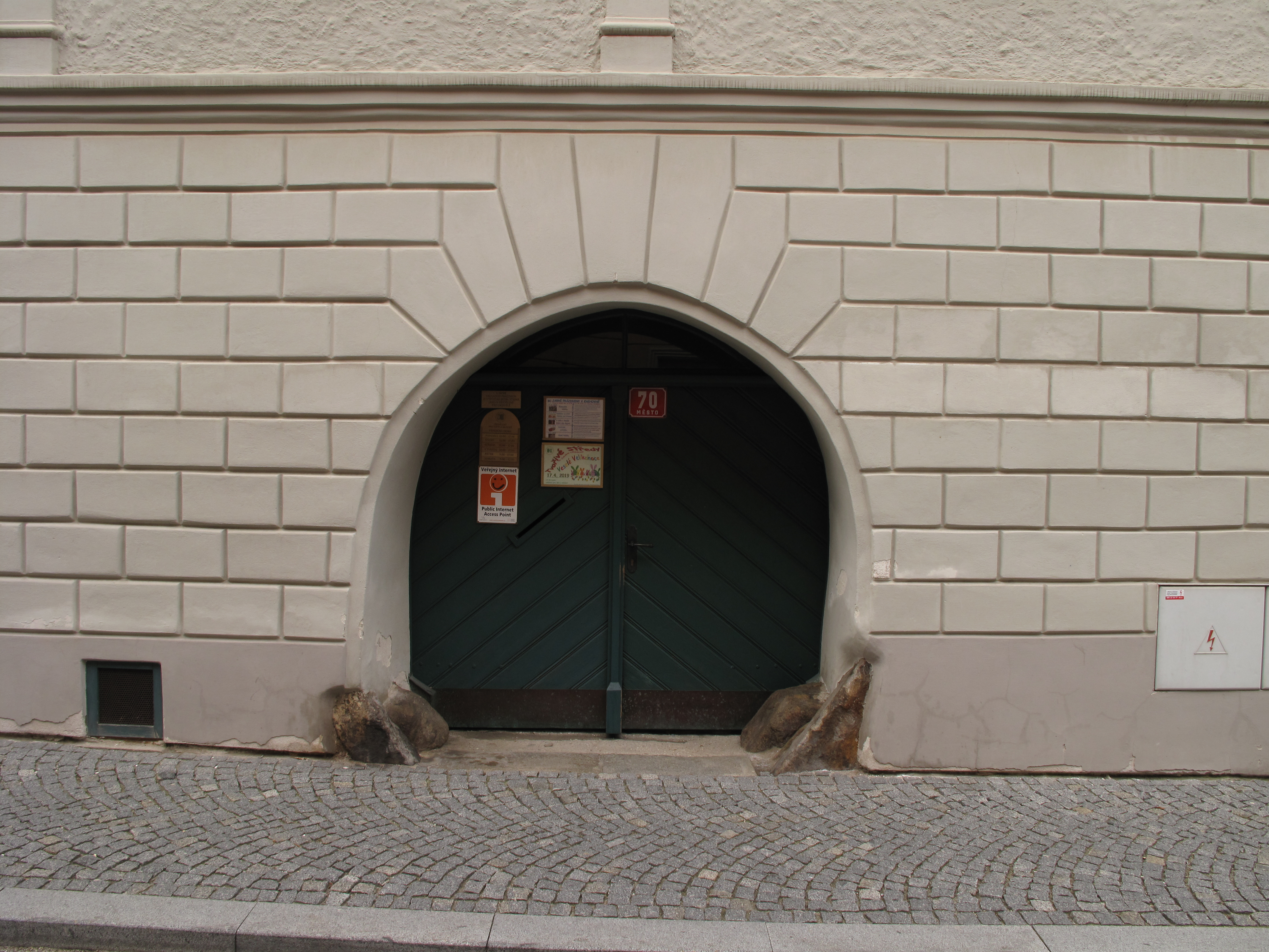 Knihovna Prachatice.